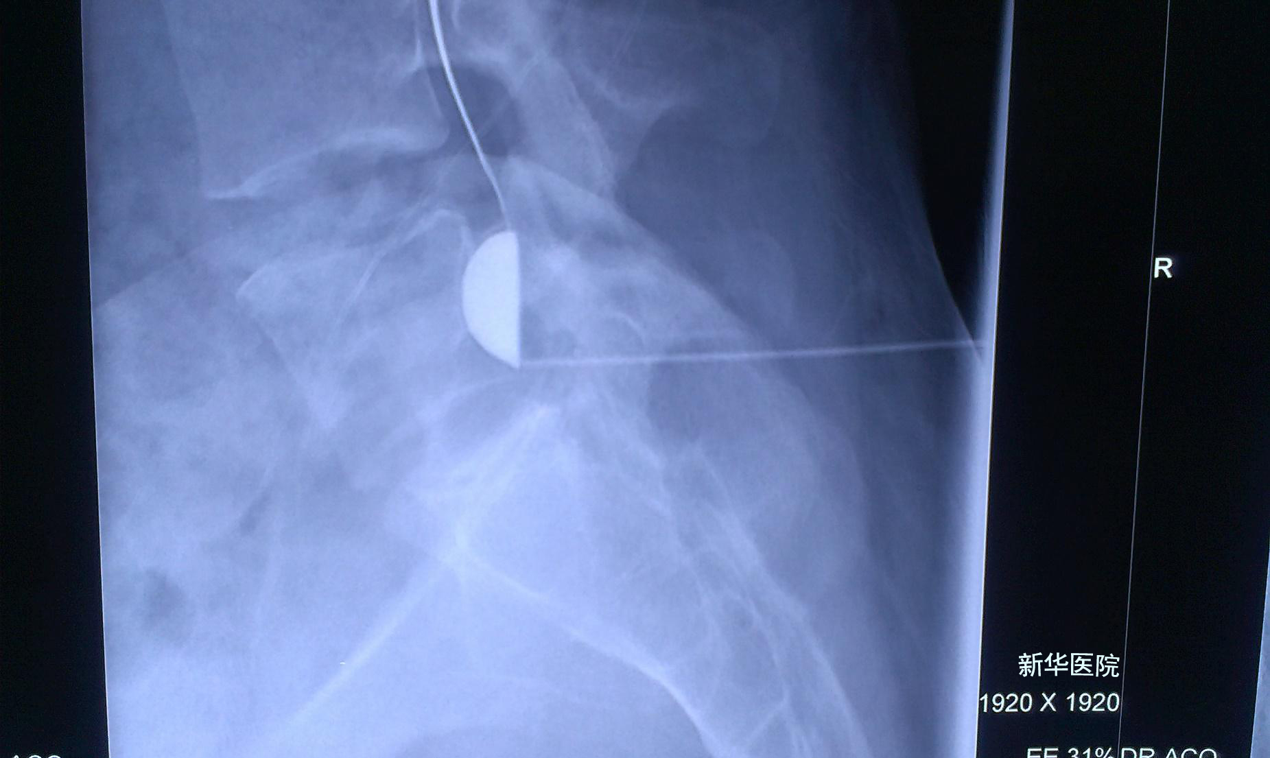 骶管囊肿造影图像，可以显示骶管囊肿与蛛网膜下腔相通。